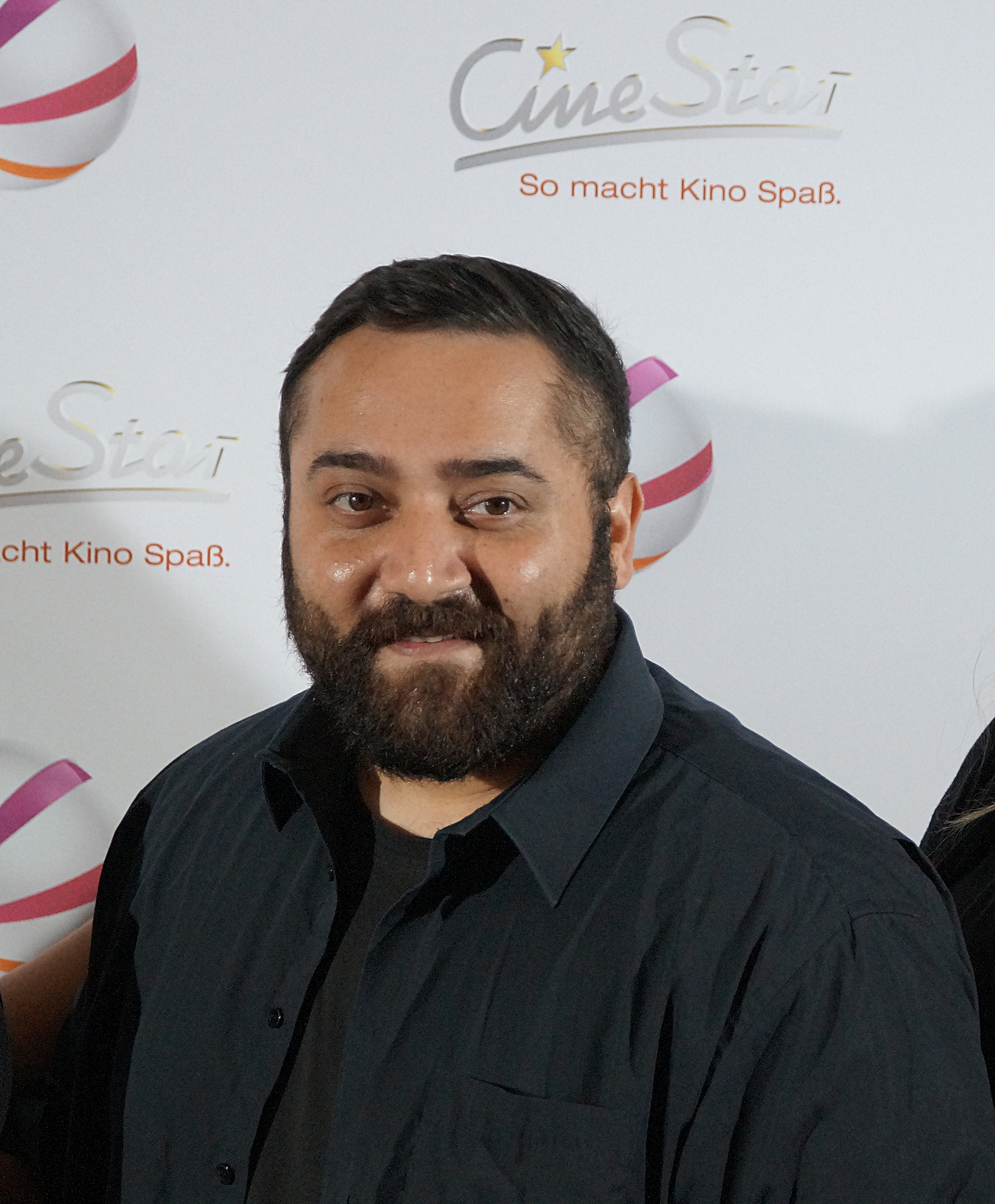 Kailas Mahadevan bei der Premiere des Sat.1 Filmes "Volltreffer", am 29.9.16, in Dortmund.